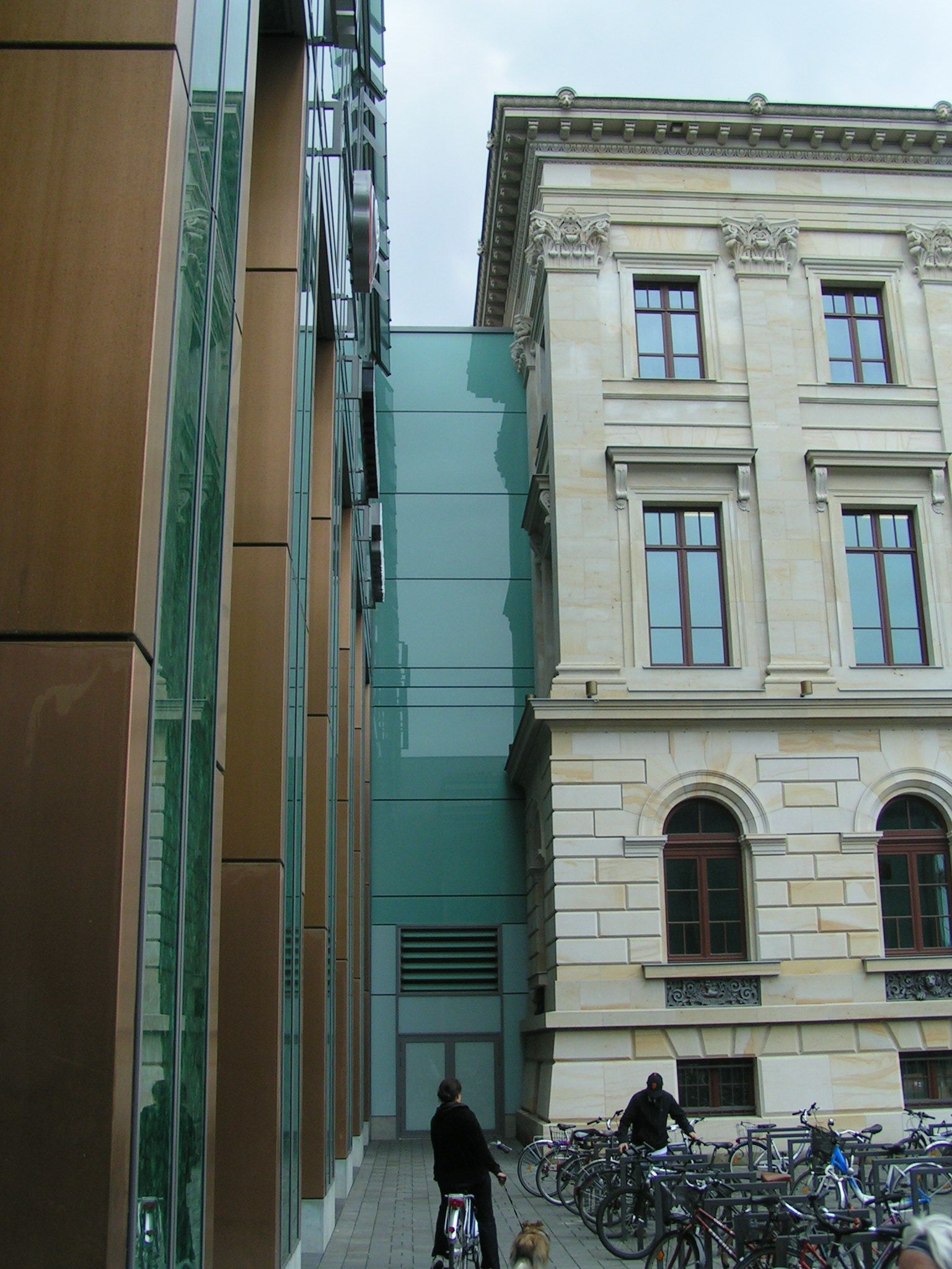 Übergang zwischen der modernen Fassade und der rekonstruierten Fassade des ehemaligen Braunschweiger Schlosses an den Schloss-Arkaden (Einkaufszentrum mit Schloss-Fassade).